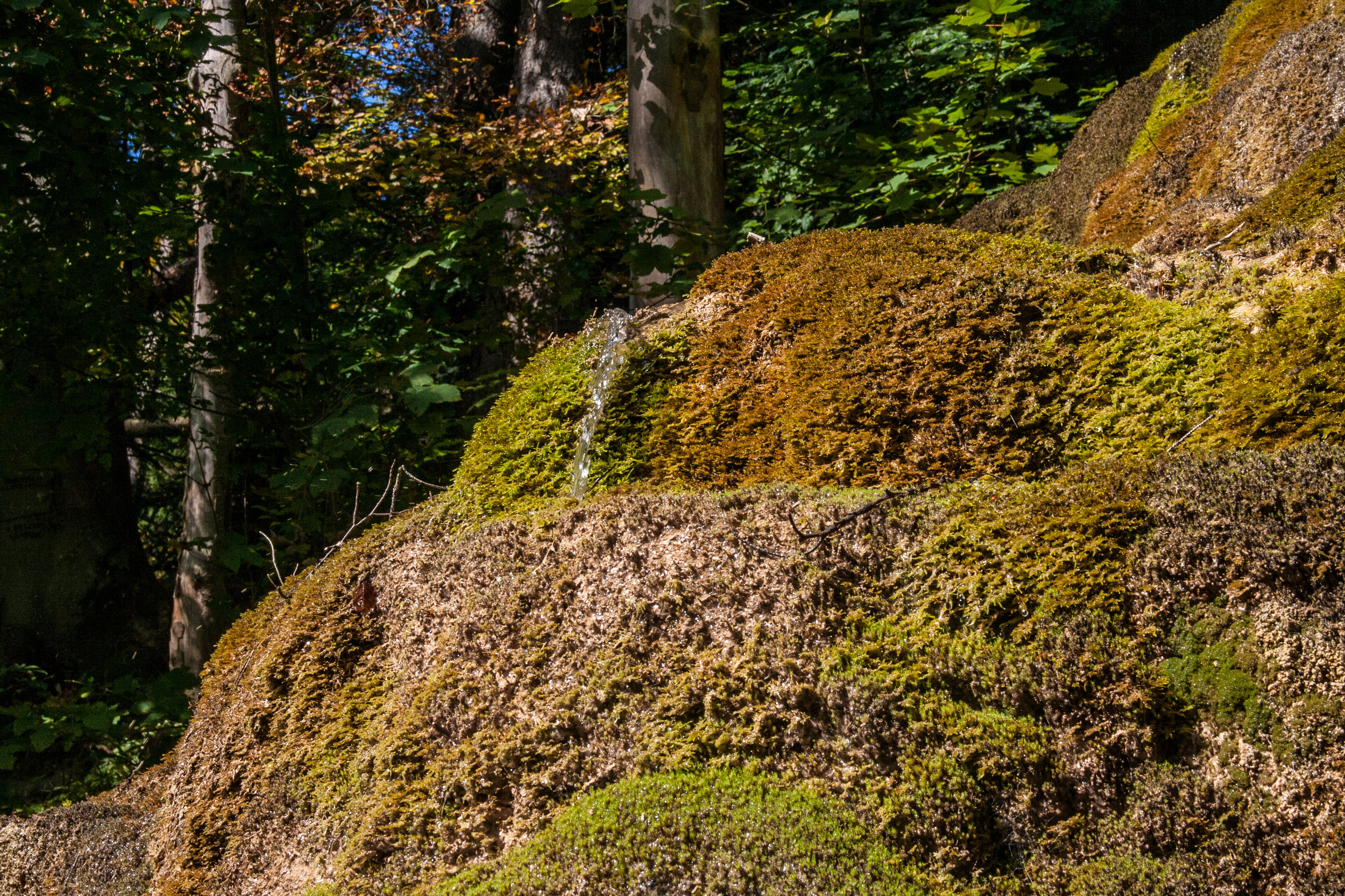 Sinterterassen "Hoher Brunnen" bei Berching